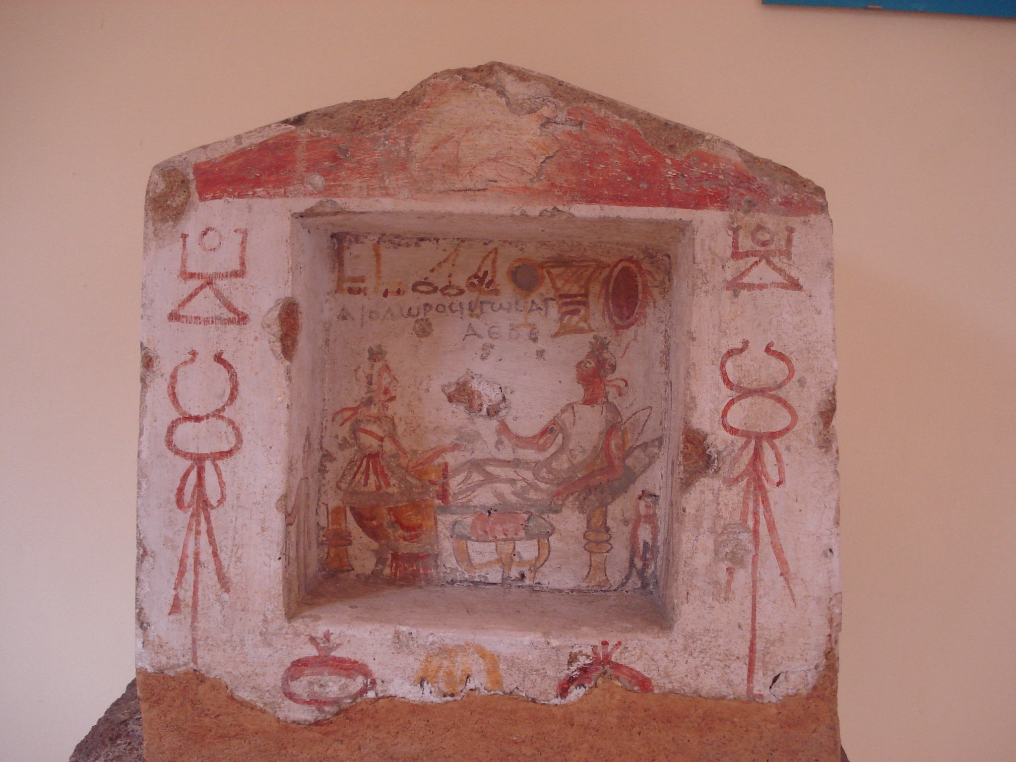 Edicola funebre affrescata greco-punica, con scena di . Epoca imperiale romana, da Marsala. Sugli stipiti, il simbolo della dea fenicia della fertilità Tanit. La scritta, che definisce "agathòs" (di buona memoria) il defunto, è in lingua greca. Museo archeologico regionale di Palermo, 28 settembre 2006. Foto di Giovanni Dall'Orto.